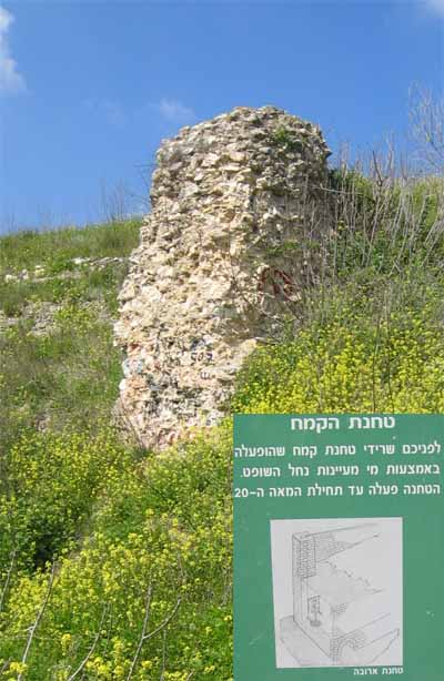 טחנת קמח בנחל שופט